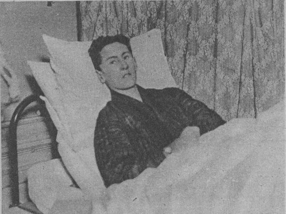 extrait du journal